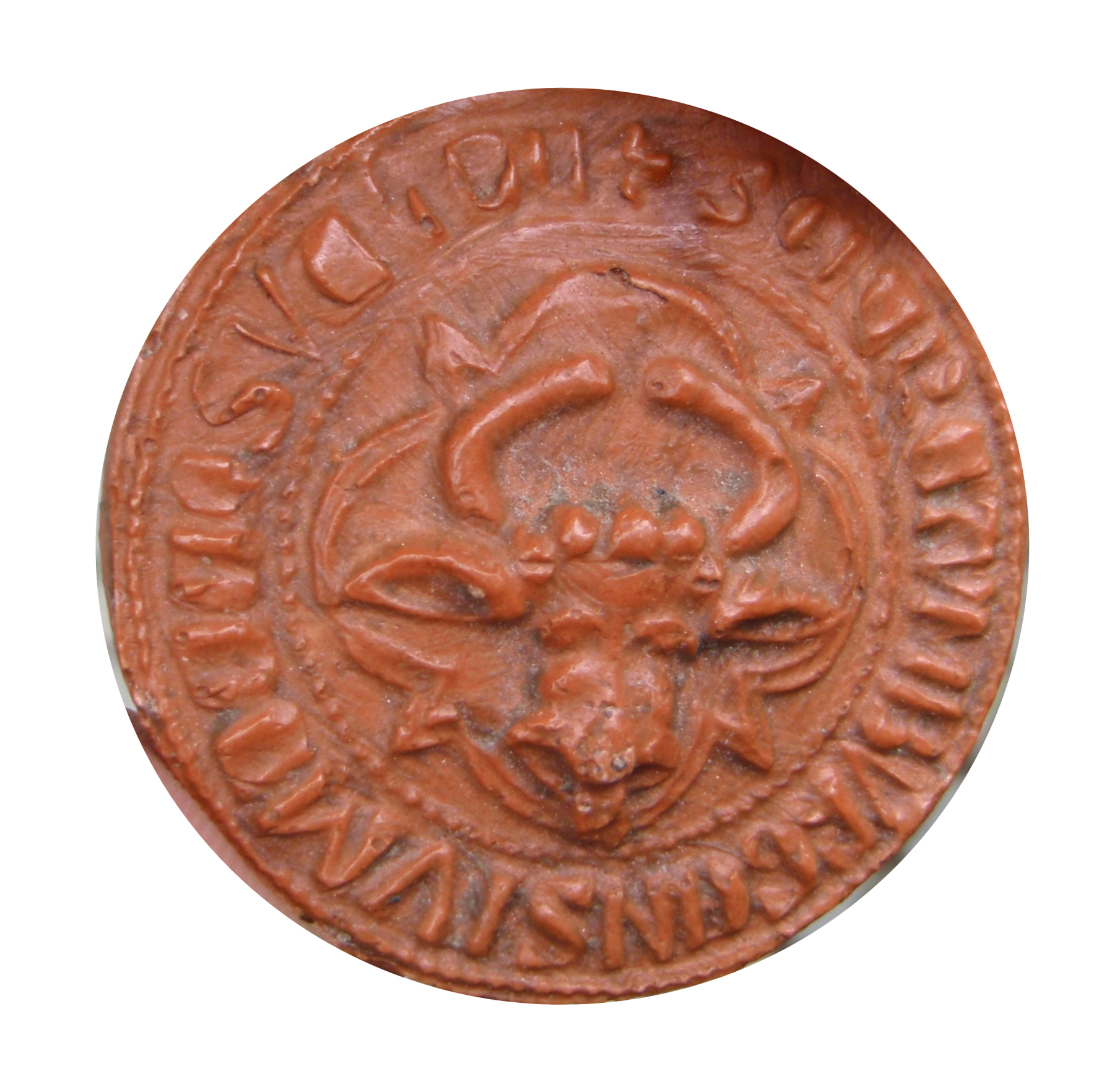 Das kleine Siegel (Sekretsiegel) der Stadt Coesfeld im Münsterland zeigt das Wahrzeichen der Stadt, den Ochsenkopf, der sich auch im heutigen Stadtwappen wiederfindet. Die Umschrift lautet "Secretum burgensium de Cosvelde". Dieses Siegel war ab 1372 in Gebrauch. Ähnliche Coesfelder Sekretsiegel wurden ab 1292 verwendet. Vgl. Dr. Hans Hüer, Geschichte der Stadt Coesfeld, nach der Darstellung von Bernhard Sökeland neu bearbeitet und bis zum Zweiten Weltkrieg fortgeführt, S. 24. Regensberg, Münster 1947.